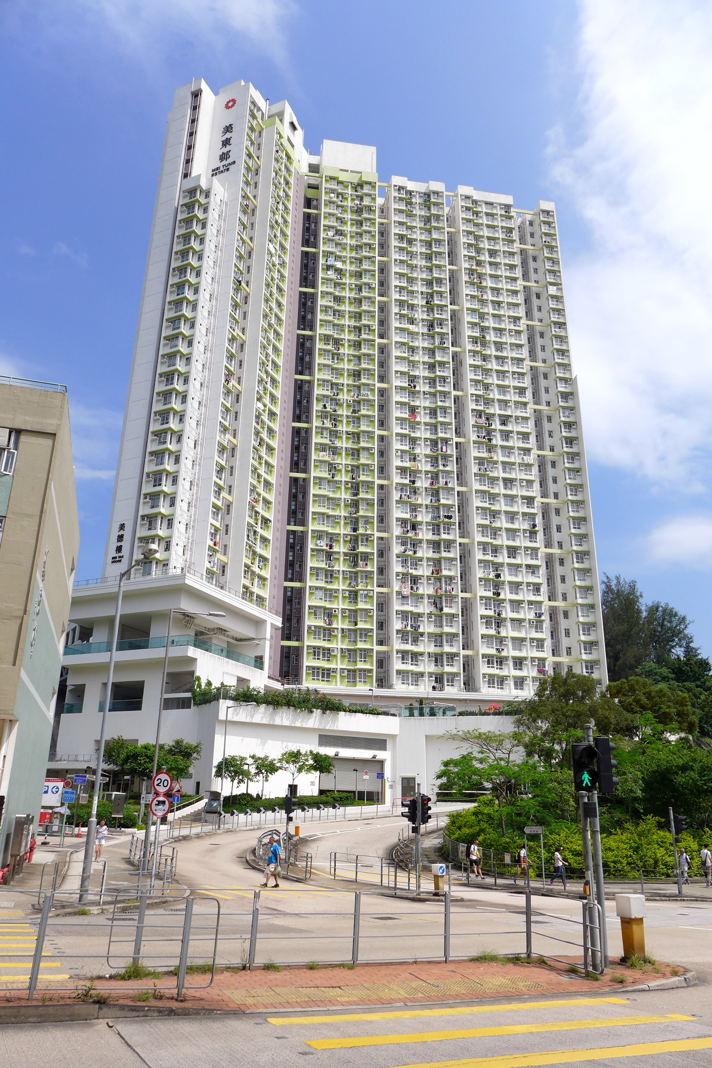 Mei Tak House, Mei Tung Estate